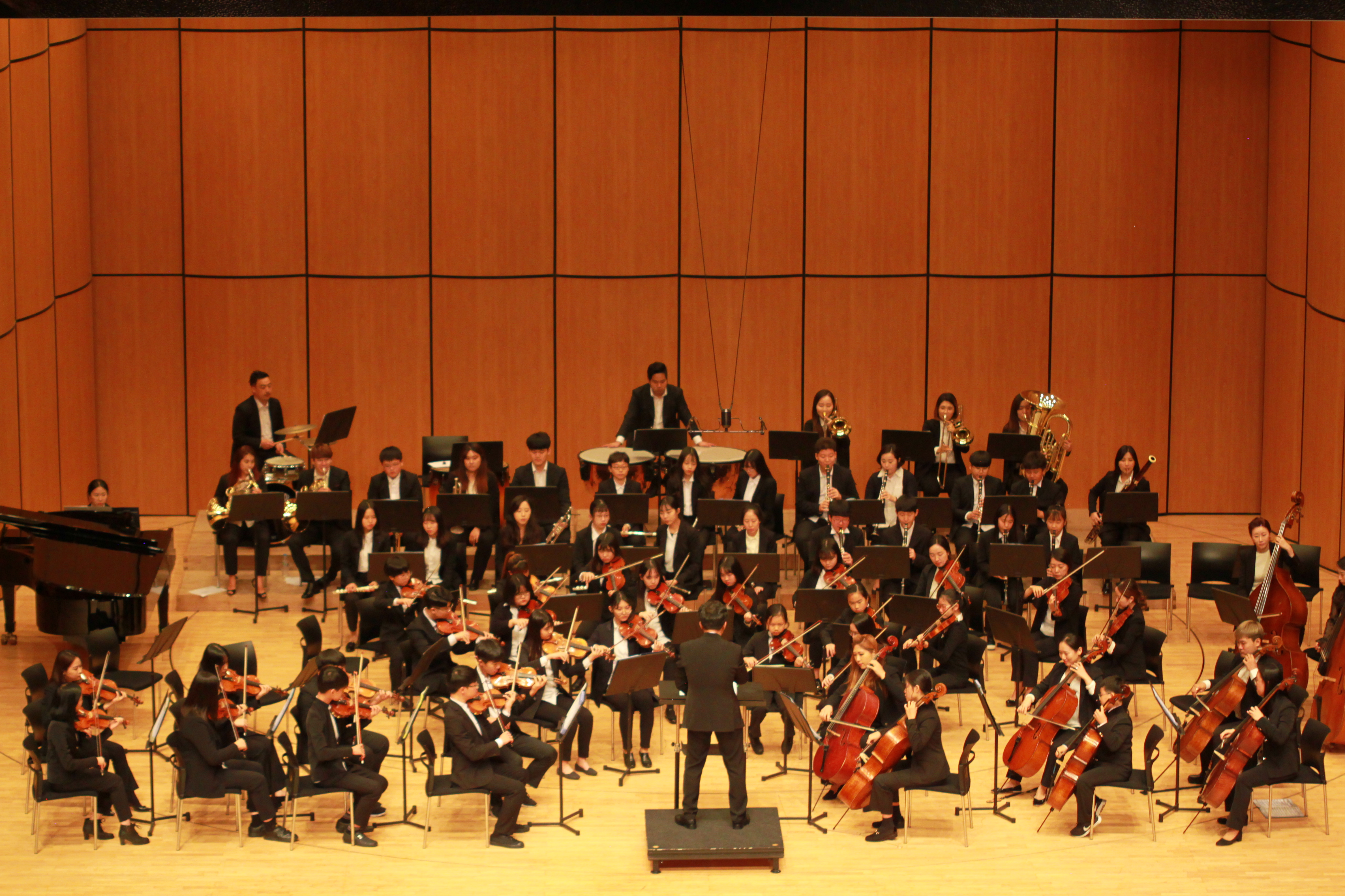 2018 제5회 천안시청소년교향악축제